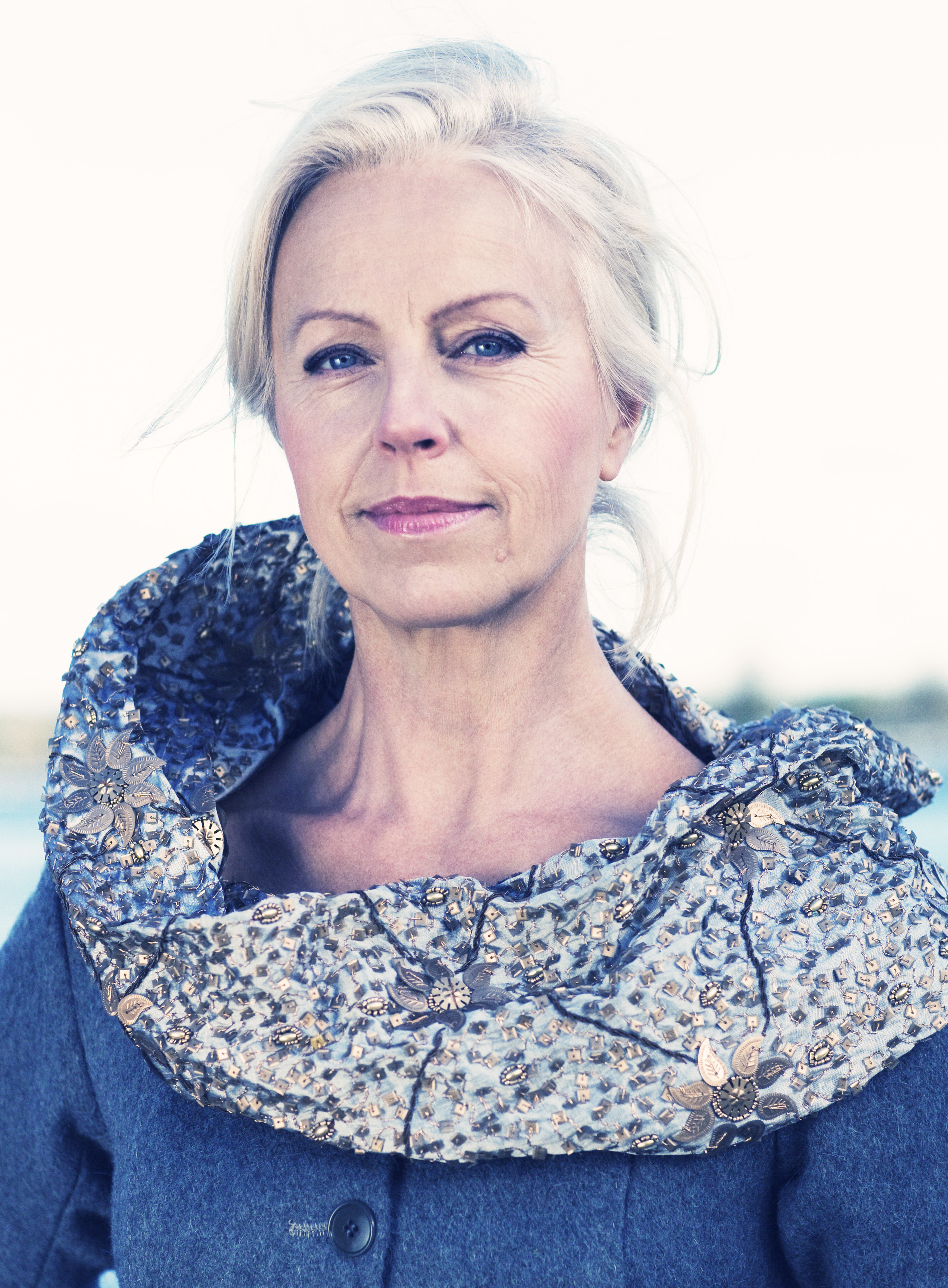 Operasångerskan Anne Sofie von Otter.